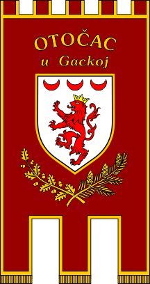 el simbolo de la cuidad de Otocac